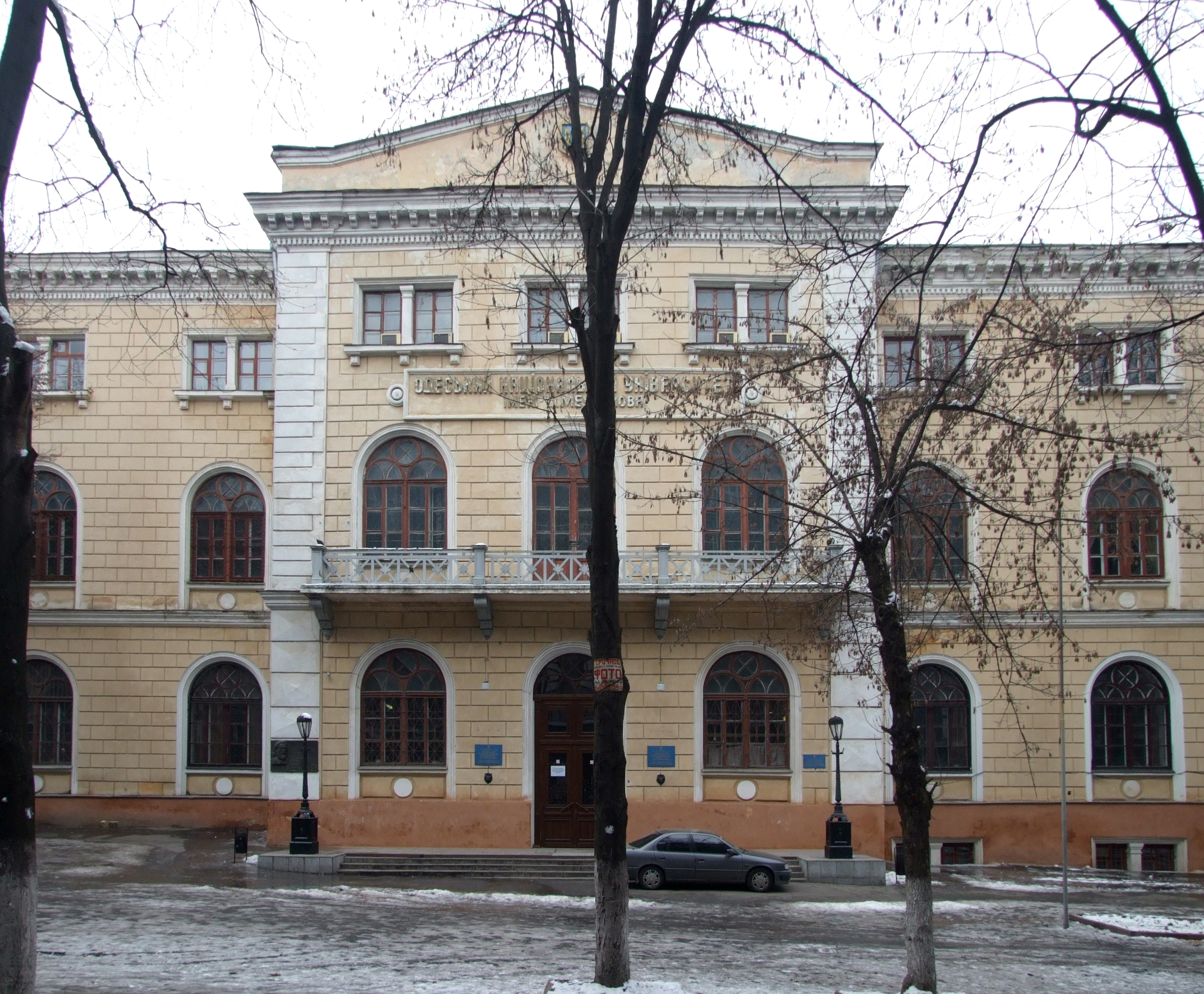 Будівля Рішельєвського ліцею (пізніше - Новоросійського університету), 1852 – 1857 рр.